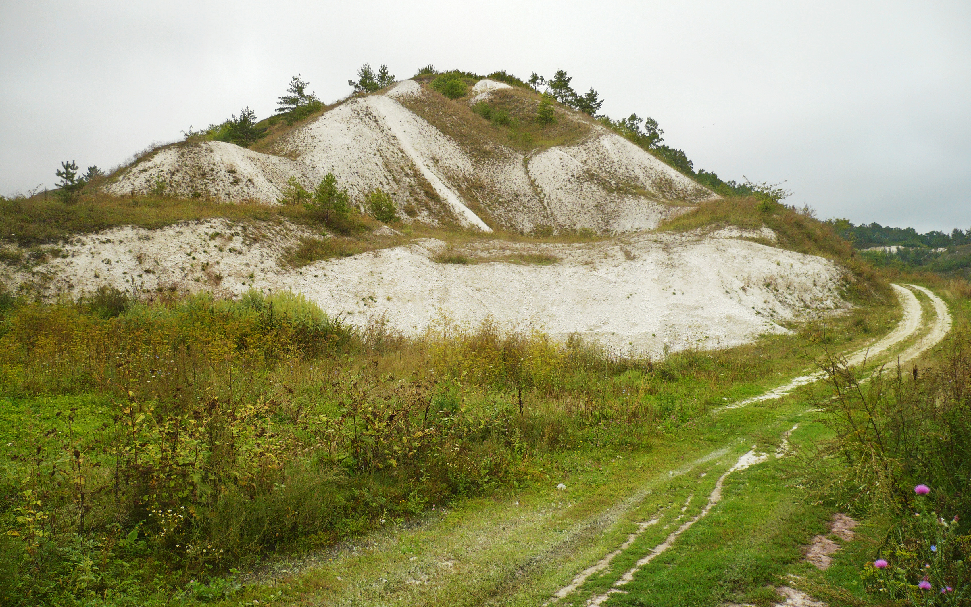 Дмитриевское городище. Вид на южную границу городища (детинца) возле села Доброе. 2012.